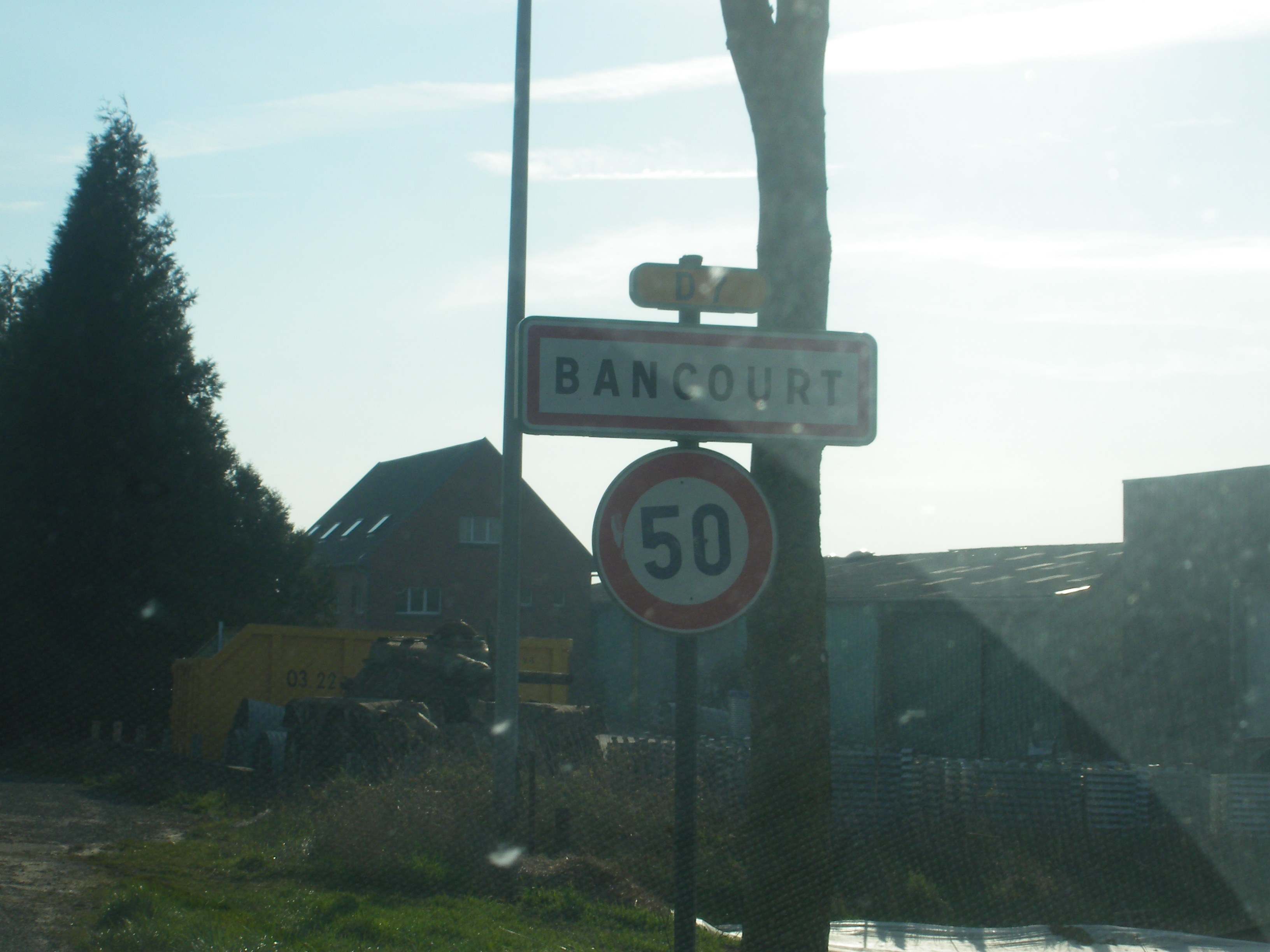 Vue d'une entrée de la commune de Bancourt.